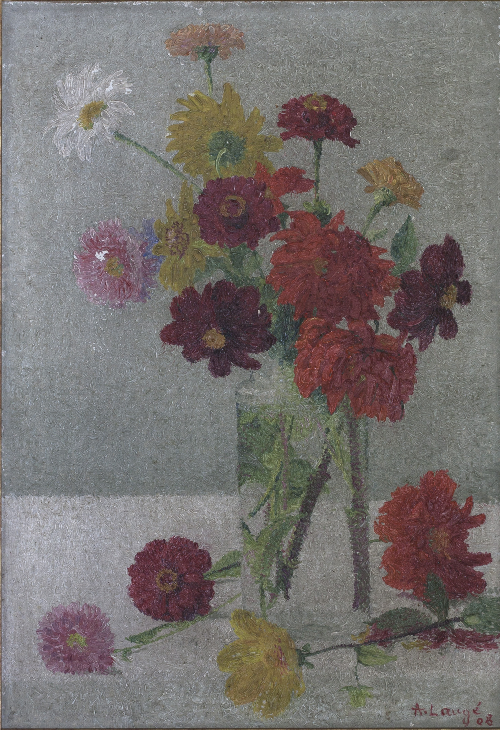 tableau